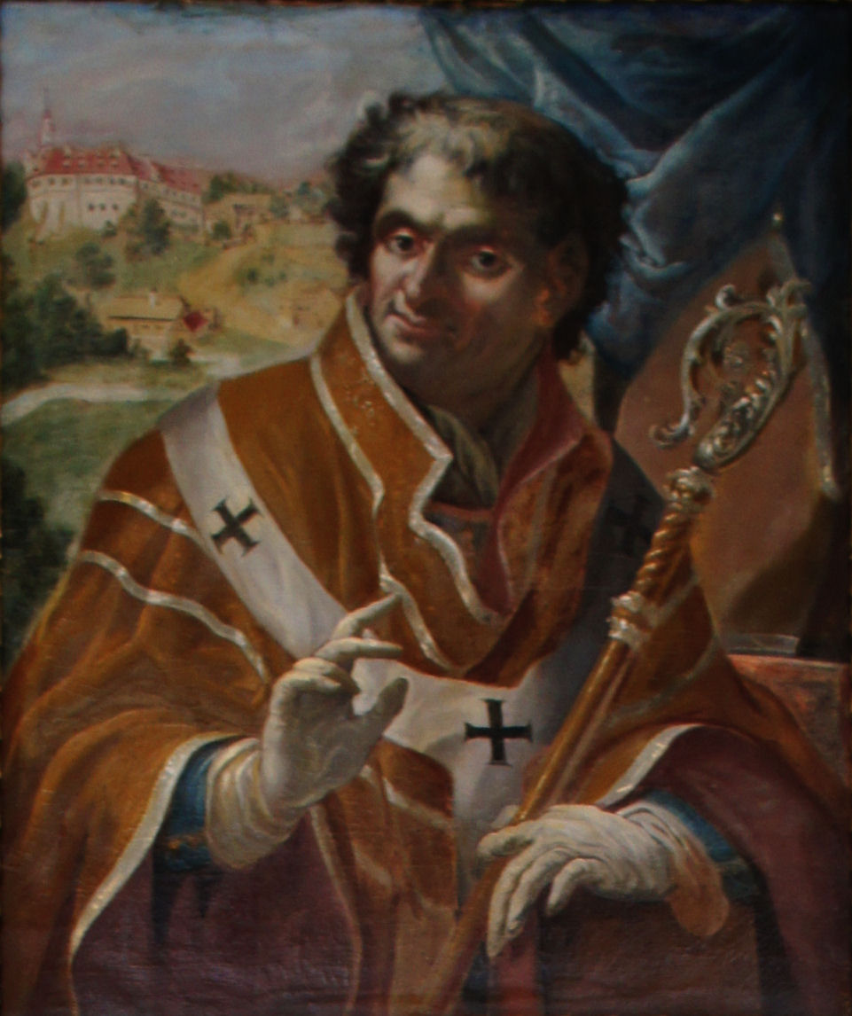 Porträtgemälde von Otto II. von Berg, Bischof von Freising, im Fürstengang zwischen Fürstbischöflicher Residenz und Freisinger Dom.